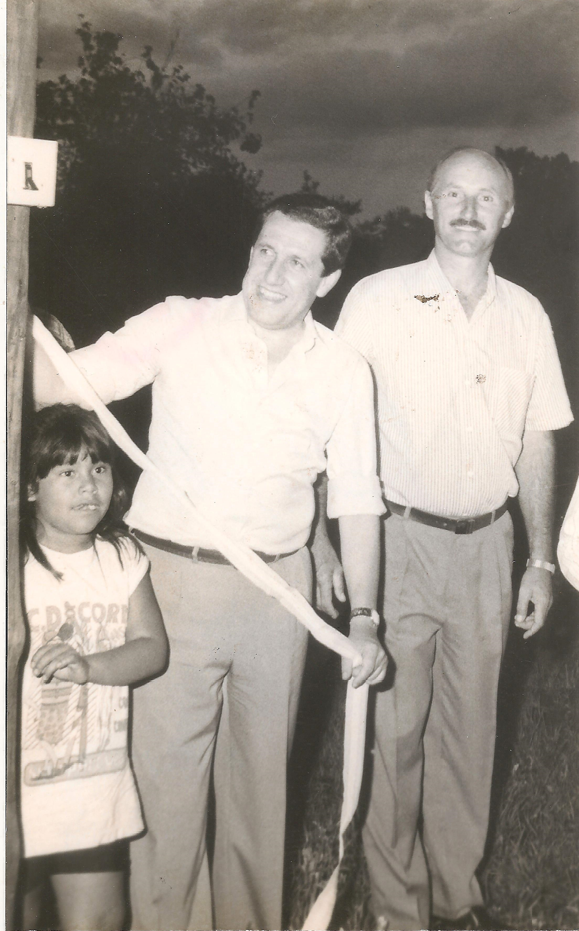 Miguel Gerula "Mejalco". Fuente: Periodista Horacio Cambeiro.